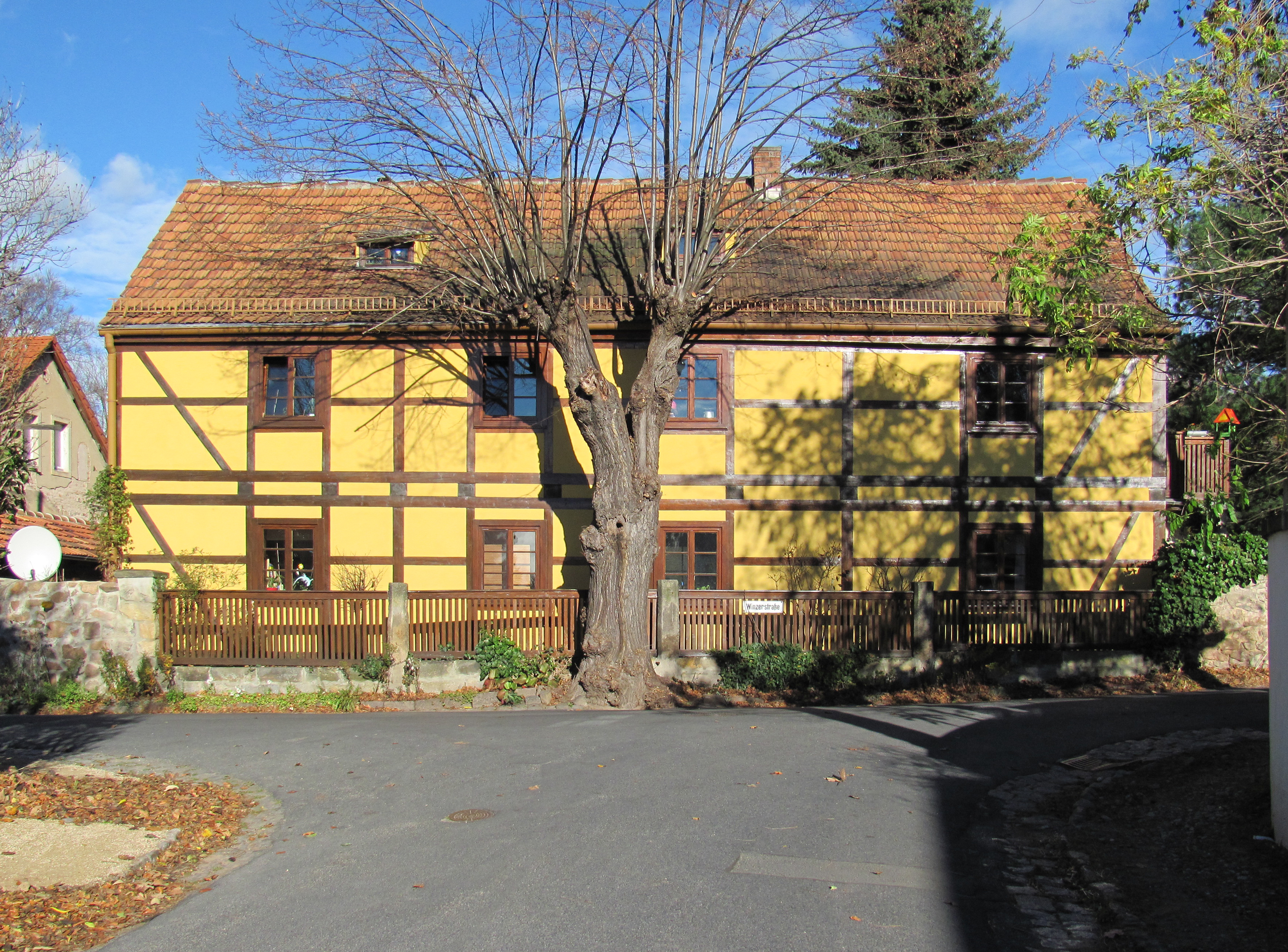 Radebeul, Haus Stephani